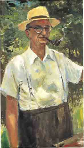 Reprografie eines Selbstporträts Fritz Pümpins (1901–1972)